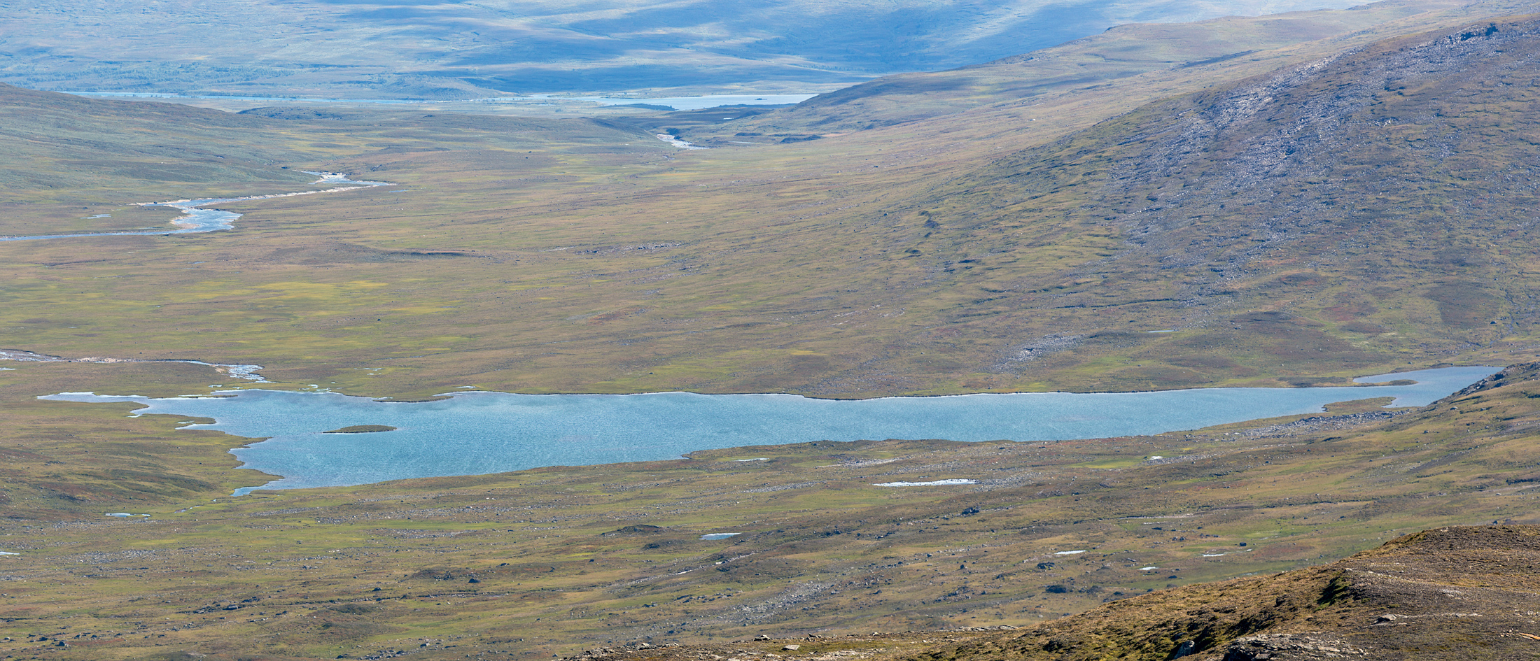 Vy mot Bájkasjávrre från berget Stibok.